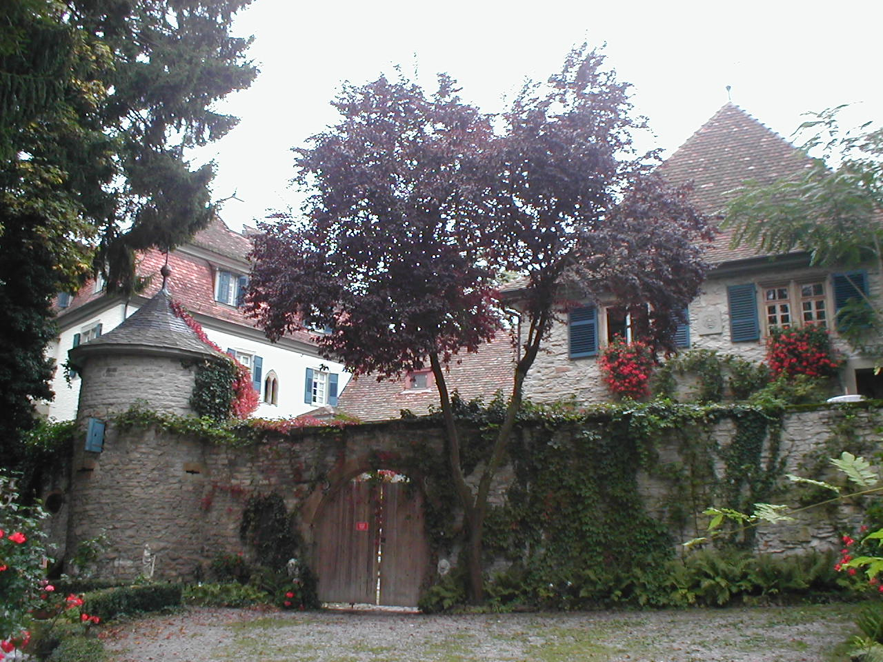 Bautzenschloss in Oedheim